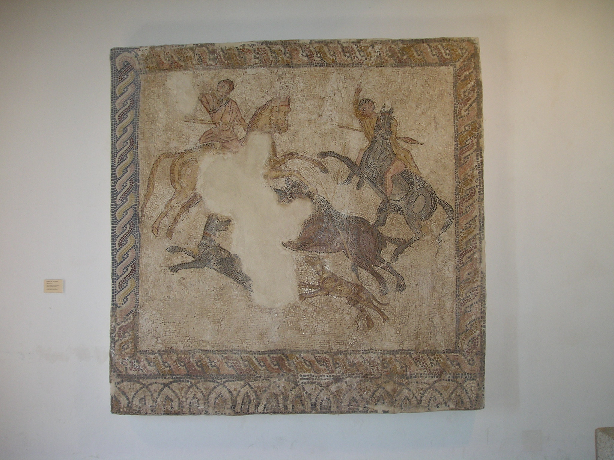 Mosaico romano del siglo IV con una escena de cacería, procedente de la Villa Romana de Olivar del Centeno, en el término municipal de Milaneses (o Milaneses de la Mata) en la provincia de Cáceres (España), actualmente conservado en el Museo de Cáceres.